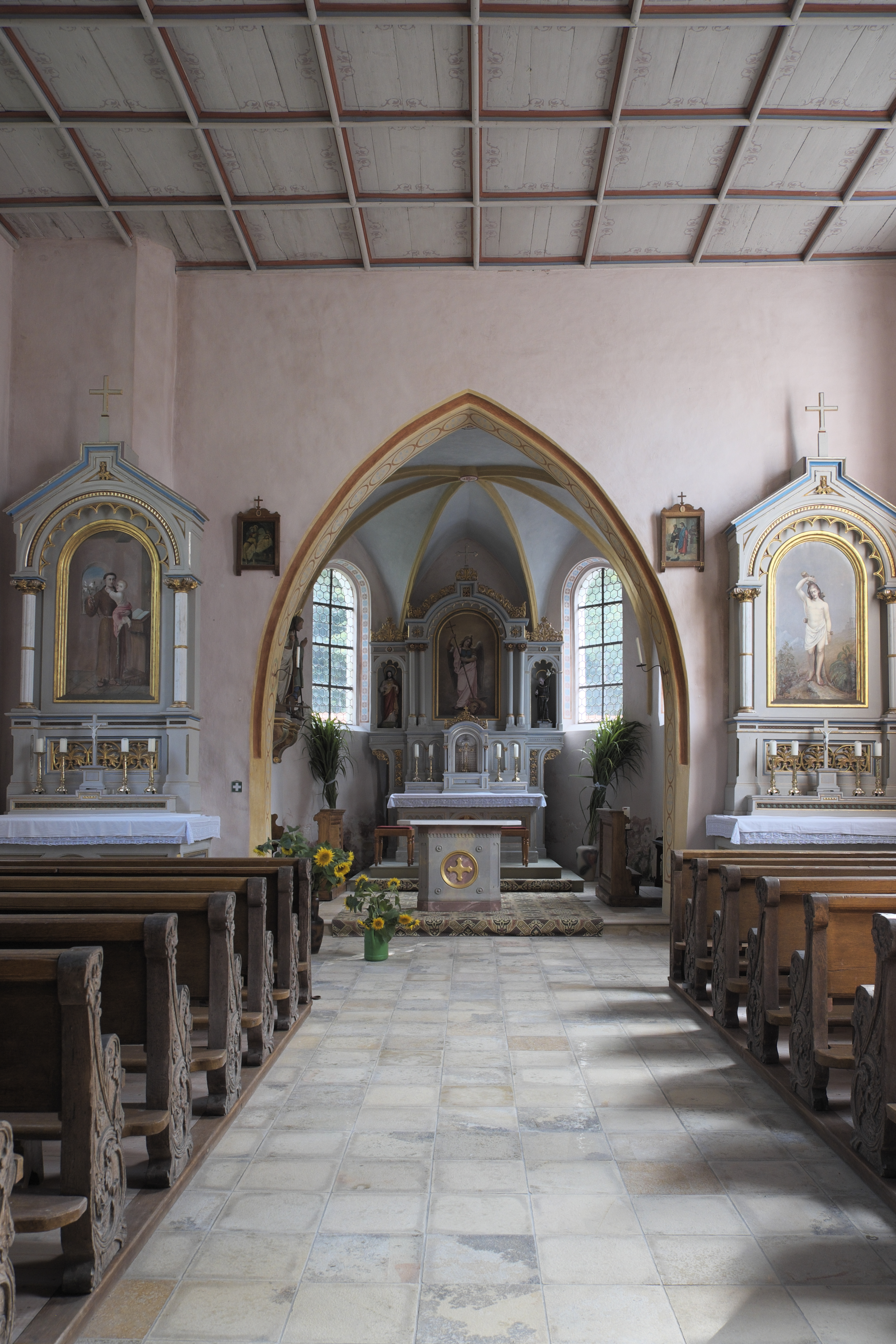 Katholische Filialkirche St. Michael, heute Friedhofskirche, in Waalhaupten (Waal) im Landkreis Ostallgäu (Bayern/Deutschland), Innenraum